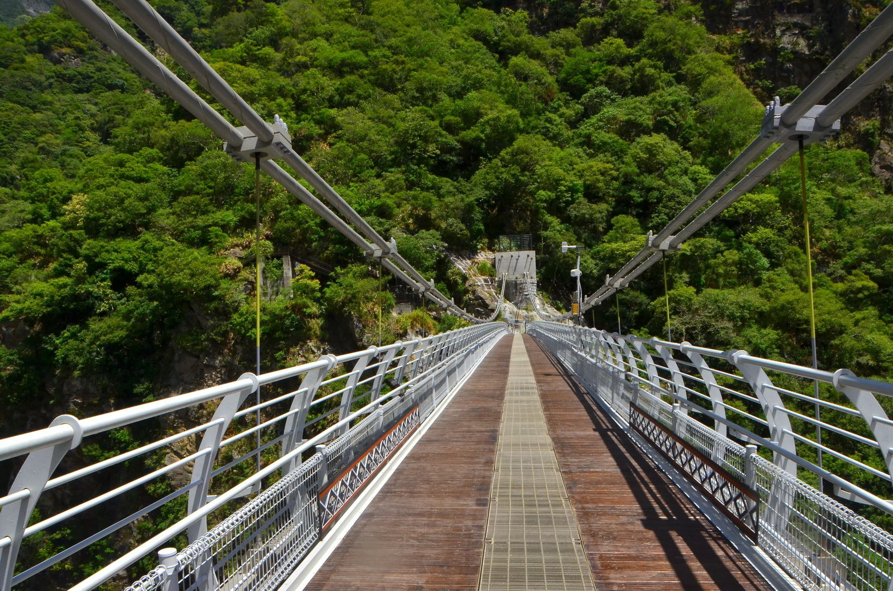 中文（台灣）: 山月吊橋的橋面中央特別設置格柵